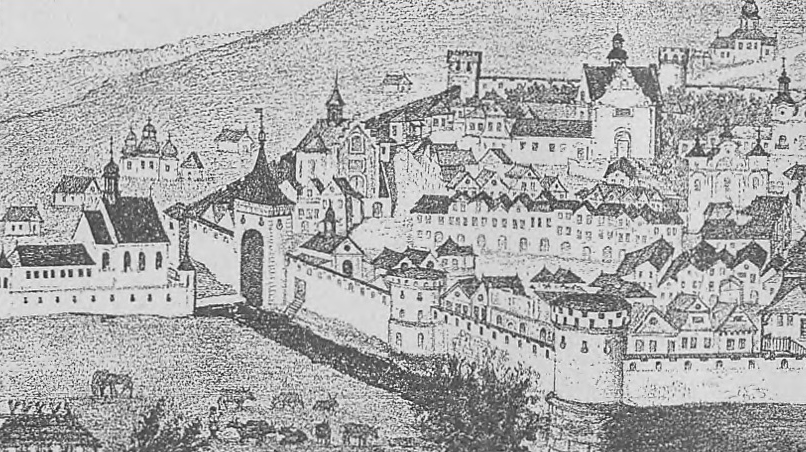 Дільниця Владиче в Перемишлі. Фрагмент плану міста.